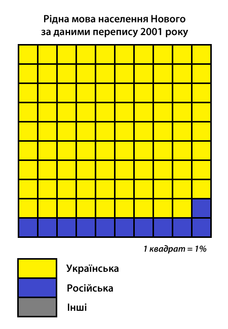 Інфографіка розподілу населення смт Нове Кіровоградської міськради за рідною мовою згідно з даними перепису 2001 року. Джерело: Розподіл населення Кіровоградської області за рідною мовою (у % до загальної чисельності населення) за переписом 2001 року